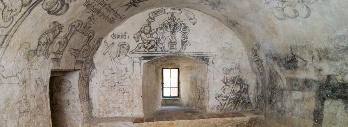 Tübngen, ehemaliger Universitätskarzer in der Münzgasse 20 mit den Schwarz-Weiß-Wandmalereien von Johann Gottfried Schreiber.